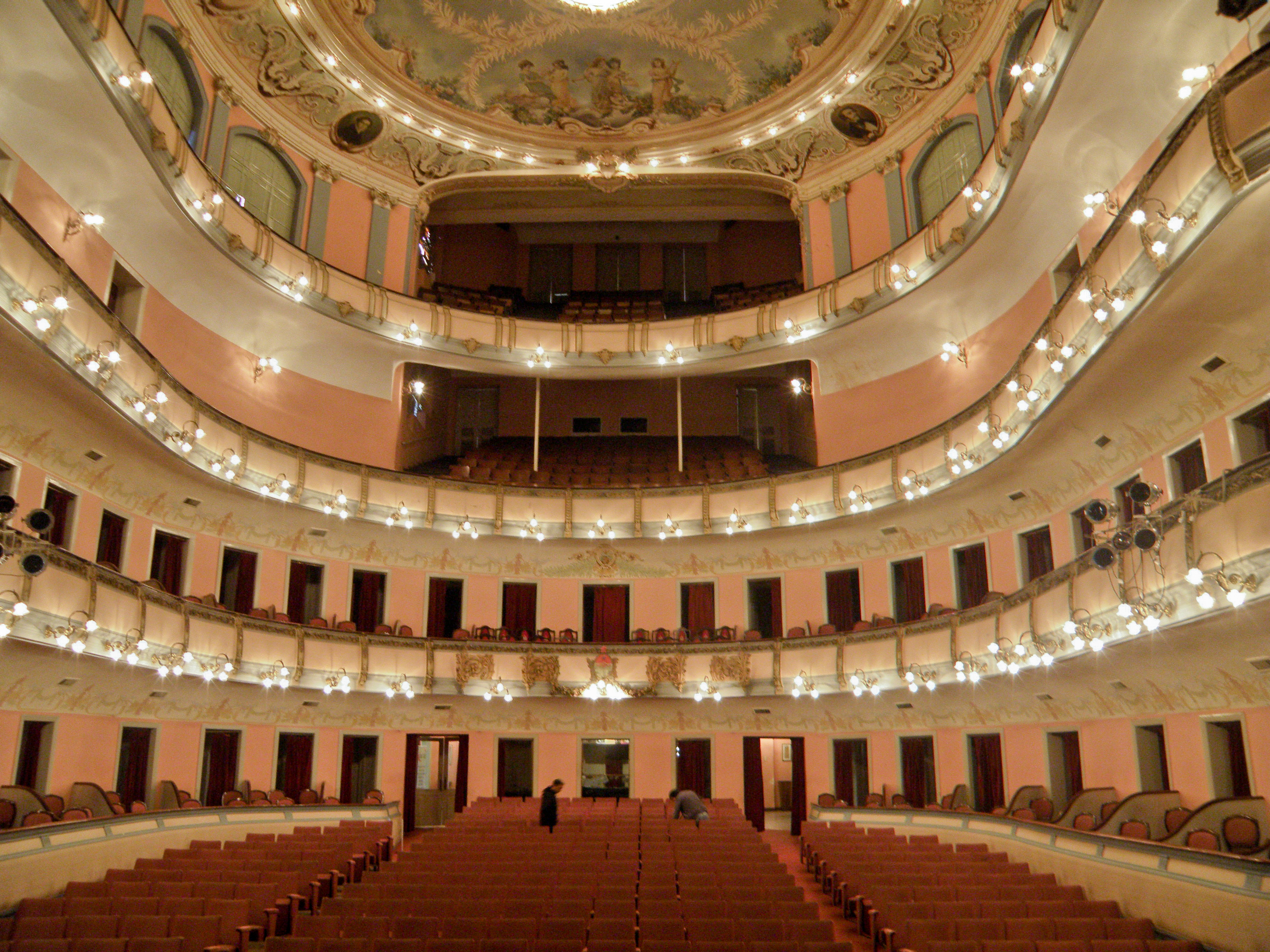 El 9 de Diciembre de 1851 se da comienzo a la edificación del primer teatro, dispuestas por el General Justo José de Urquiza. La inauguración tuvo lugar el domingo 8 de agosto de 1.852. El gobernador delegado era por entonces Antonio Crespo, quien en su discurso señala el reconocimiento a la Batalla de Caseros para su denominación "3 de Febrero".